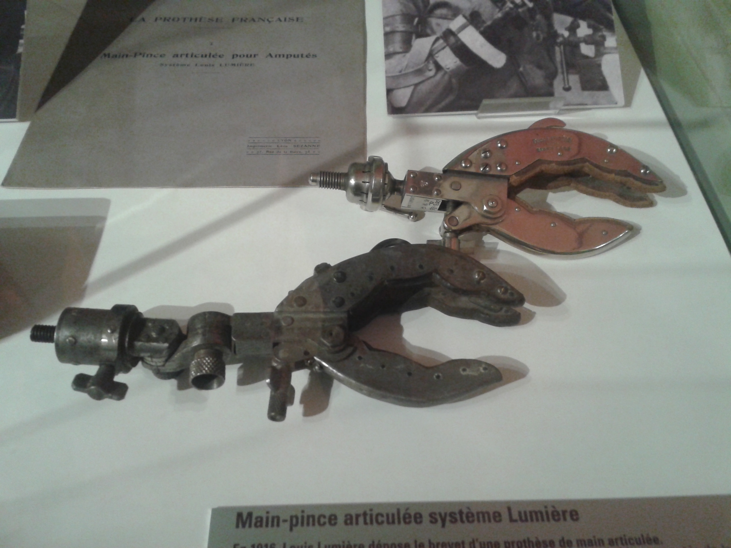 Prototype de Main-pince inventée par Louis Lumière vers 1915. 5 000 exemplaires d'entre-elles seront fabriqués à partir de 1916 dans les usines de Lyon, pour les amputés de la première guerre mondiale.